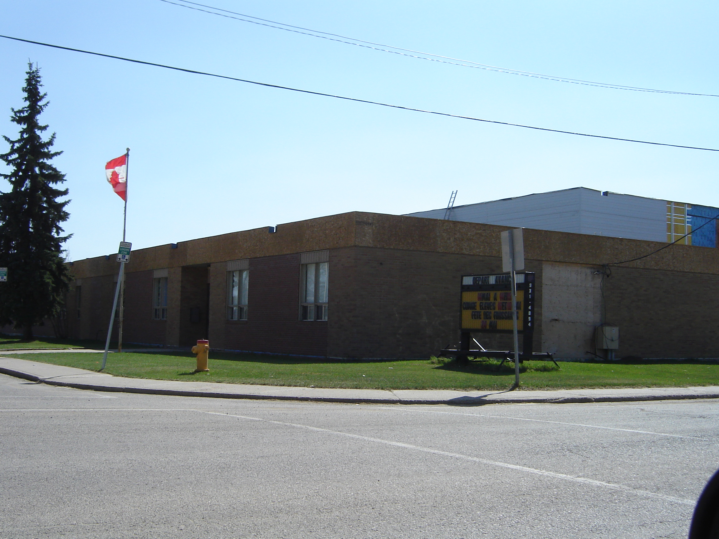 L’École canadienne-française de Saskatoon Pavillon secondaire Nutana Park, Saskatoon